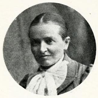 ウィリス・ホイットニーの妻マリー